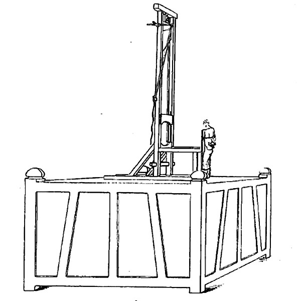 dessin de la première guillotine mise en situation.